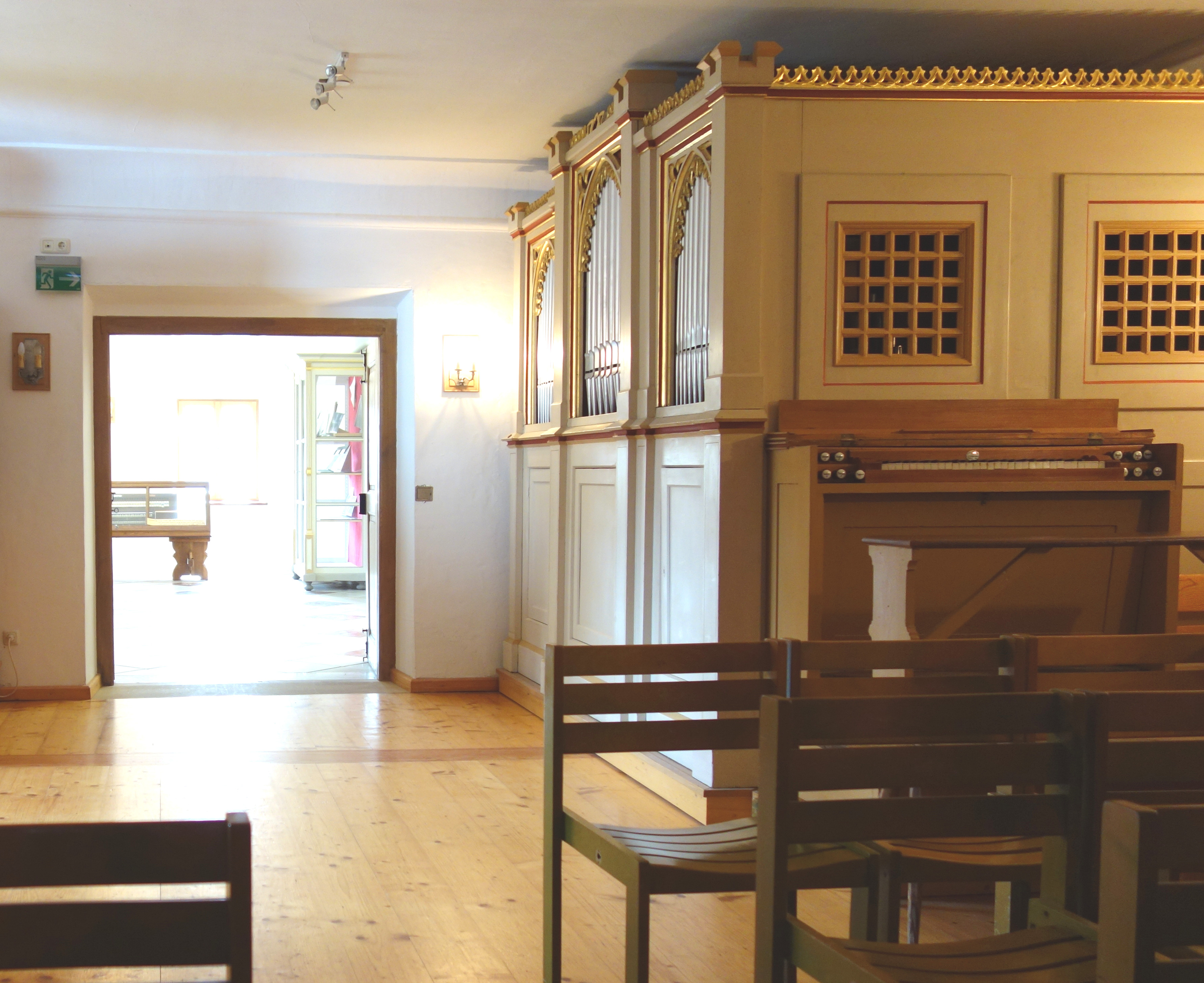 Die Steinmeyer-Orgel op. 54 aus Gerolfingen im Orgelzentrum Valley (1865, I/10)